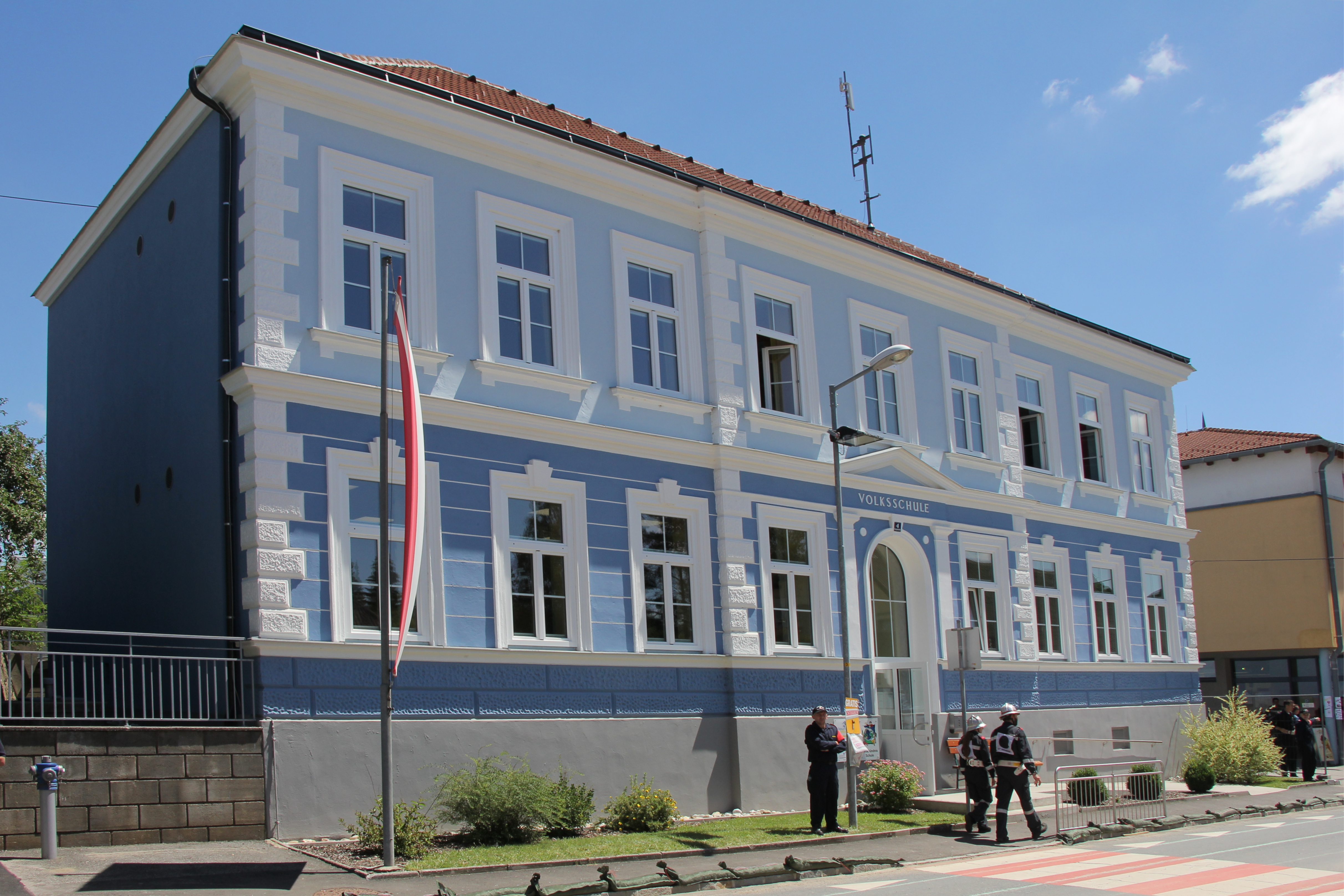 Eindrücke vom NÖ Landesfeuerwehrleistungsbewerb 2018 in Gastern - Volksschule in Gastern